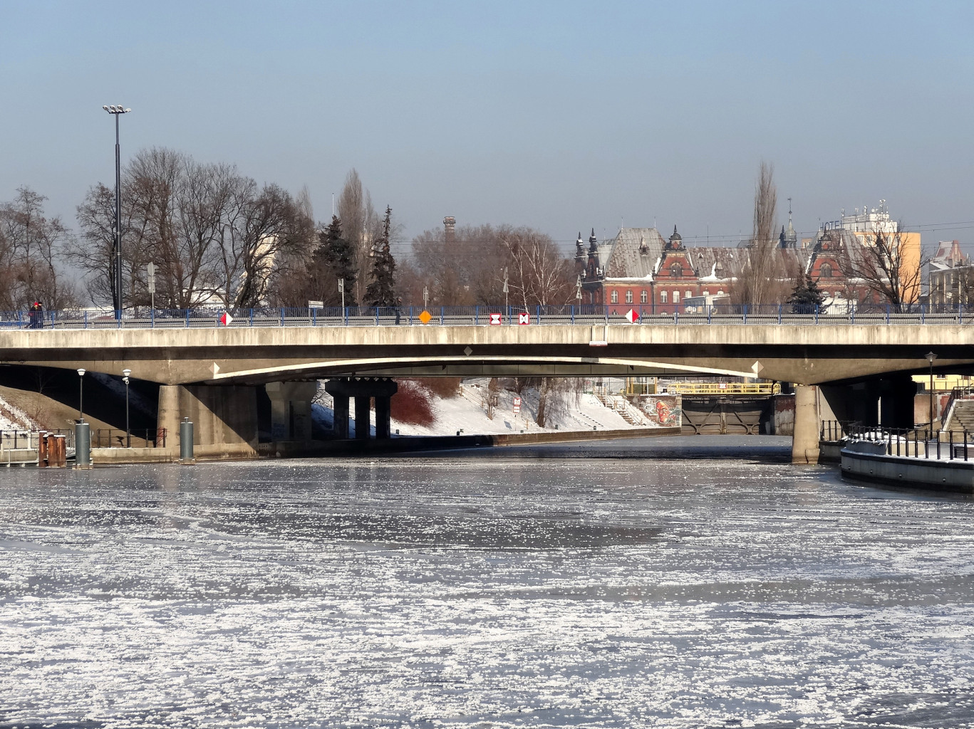 Mosty Solidarności nad Brdą w Bydgoszczy